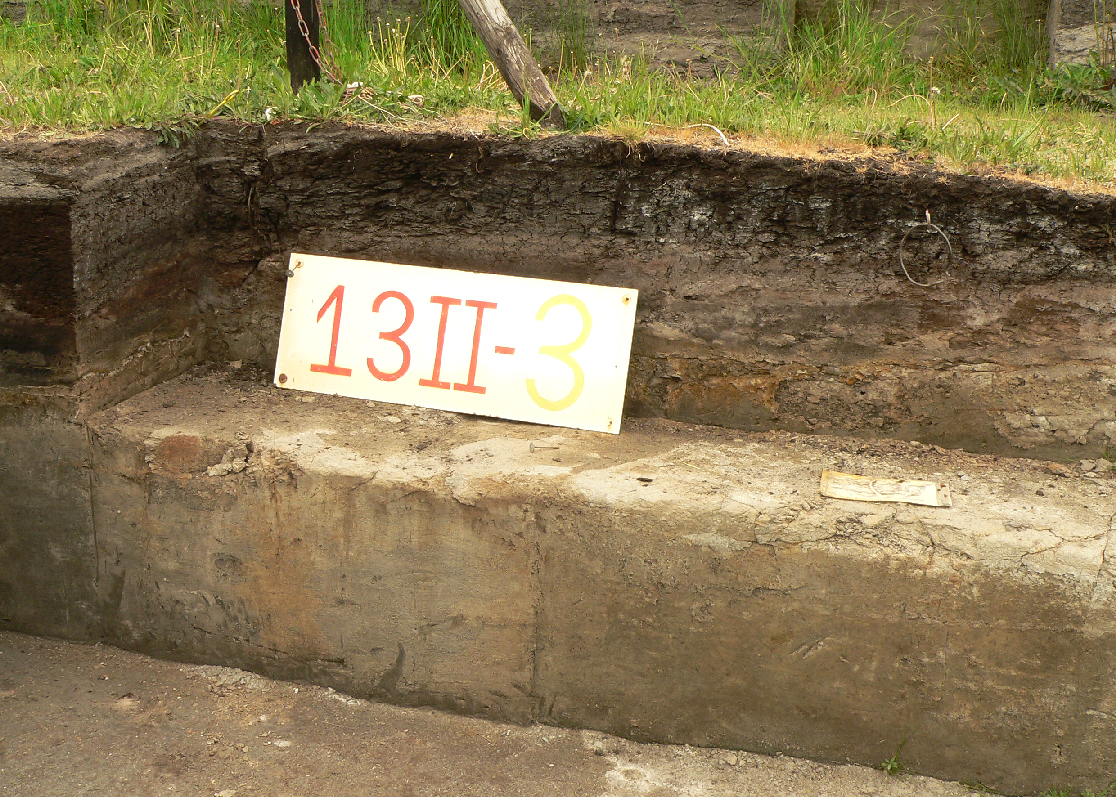 Markierung der Fundstelle und Fundschicht 13 II 3 am Fundort des Waldelefanten von Schöningen